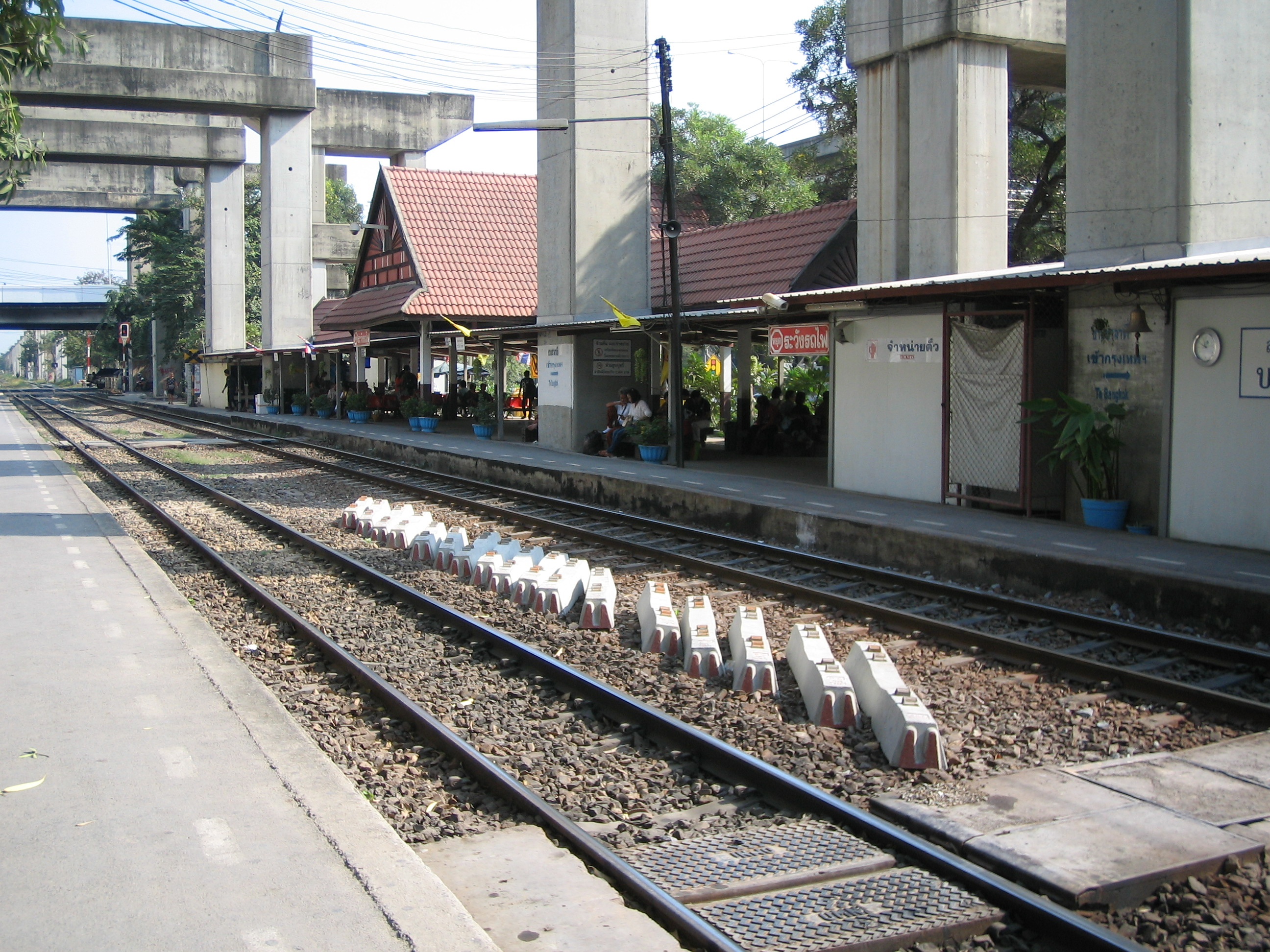 バーンケン駅構内